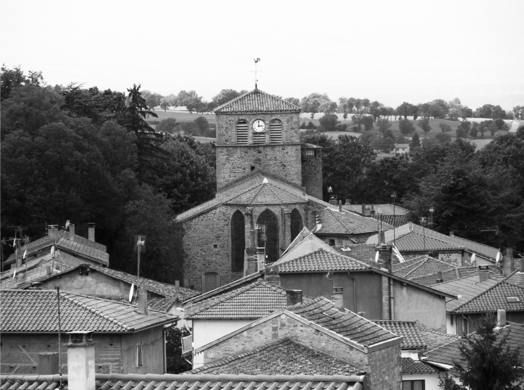 Village de Chevrières (42140) vu depuis le lotissement Rampeau.